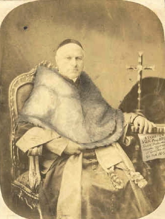 Victor Scheppers (1802-1877)